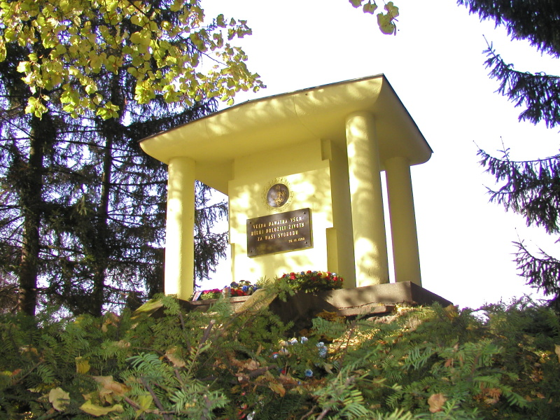 památník